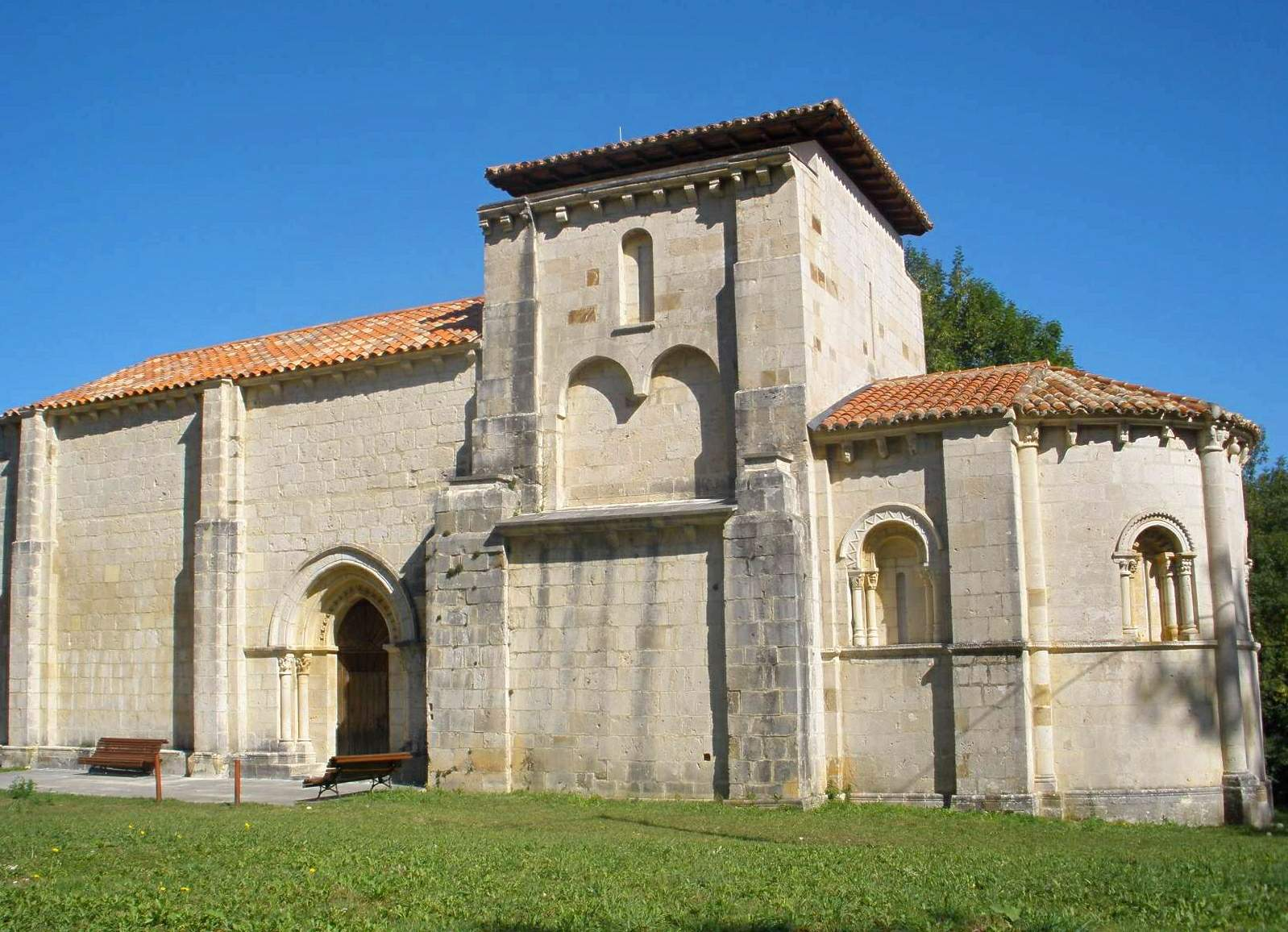 Iglesia de Santa María de Siones, en Quintanilla de Siones (Burgos)